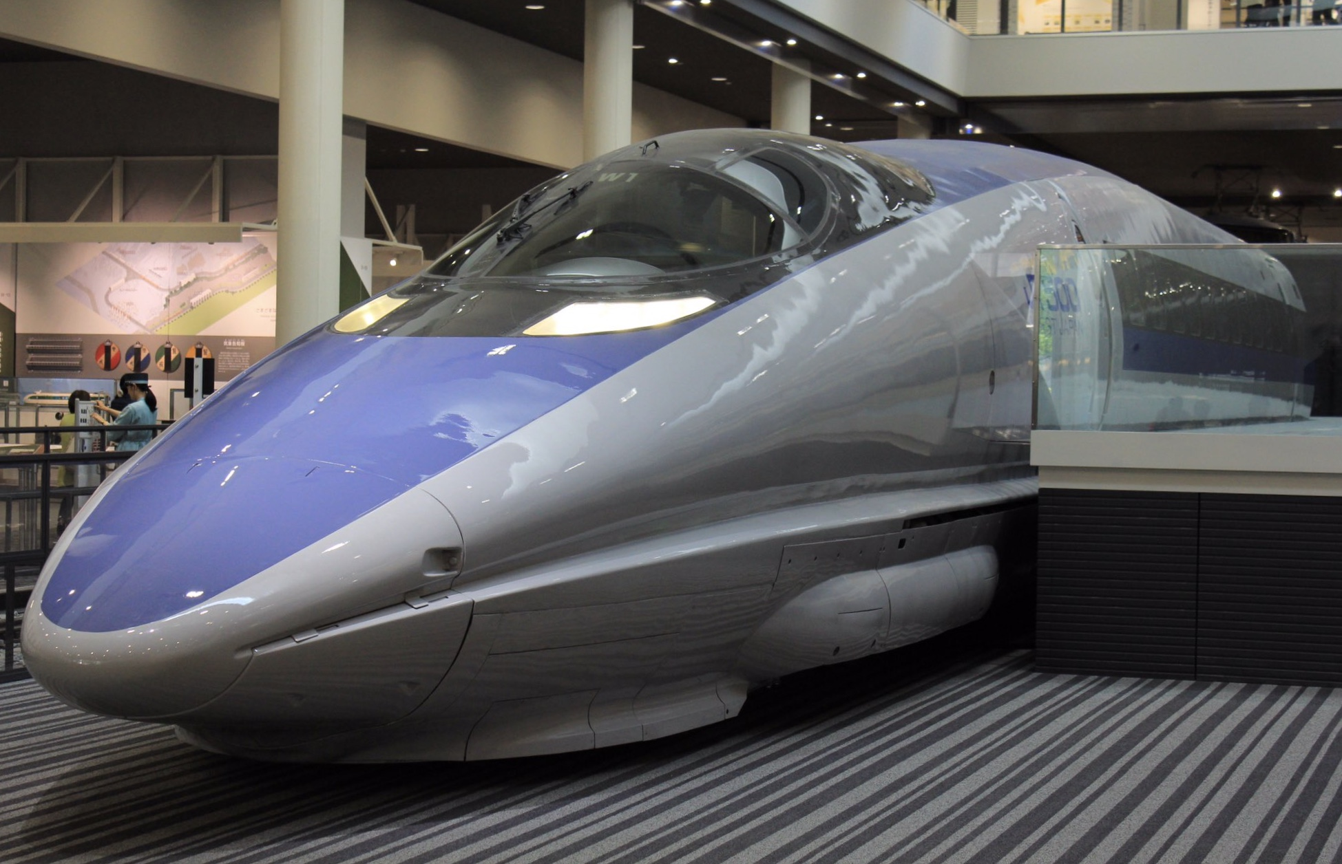 京都鉄道博物館にある500系新幹線W1編成1号車521-1